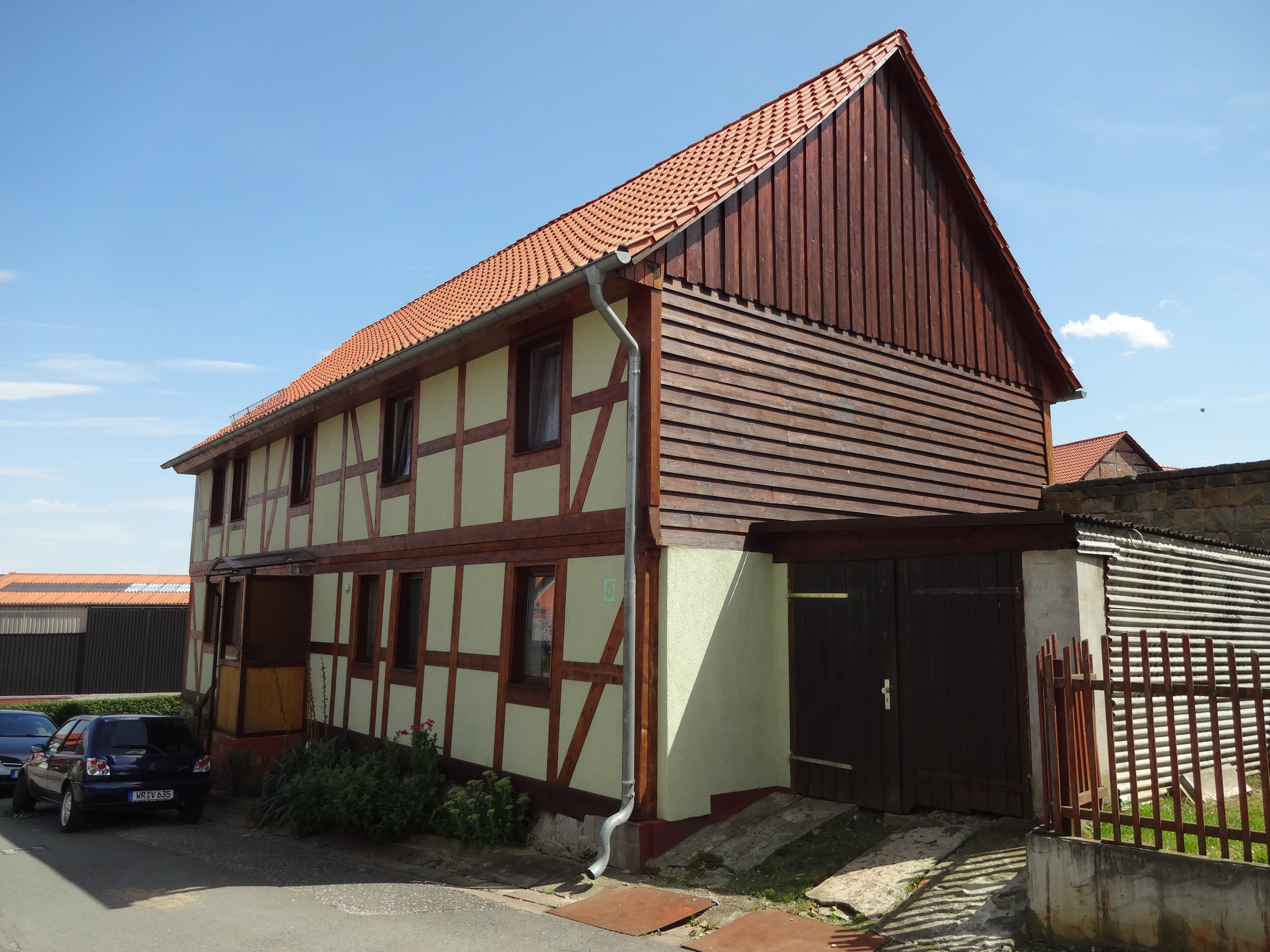 denkmalgeschütztes Wohnhaus in der Langen Straße 5 in Börnecke, Ortsteil von Blankenburg/Harz